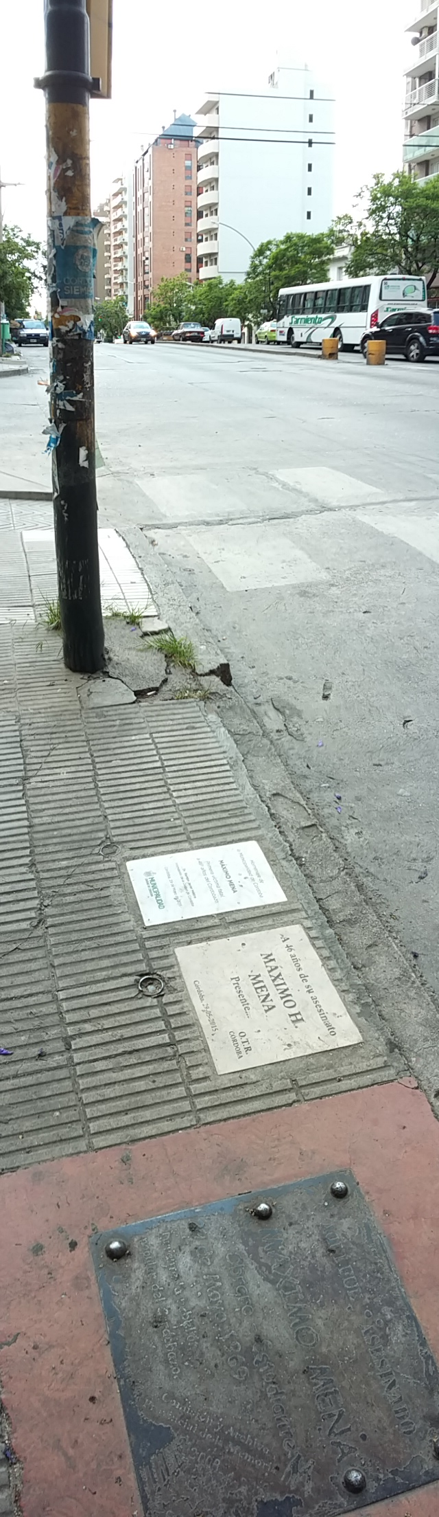 Argentina. Cordobazo. Lugar donde fue asesinado Máximo Mena el 29 de mayo de 1969. Ciudad de Córdoba, esquina Bvrd. San Juan y Arturo M. Bas.